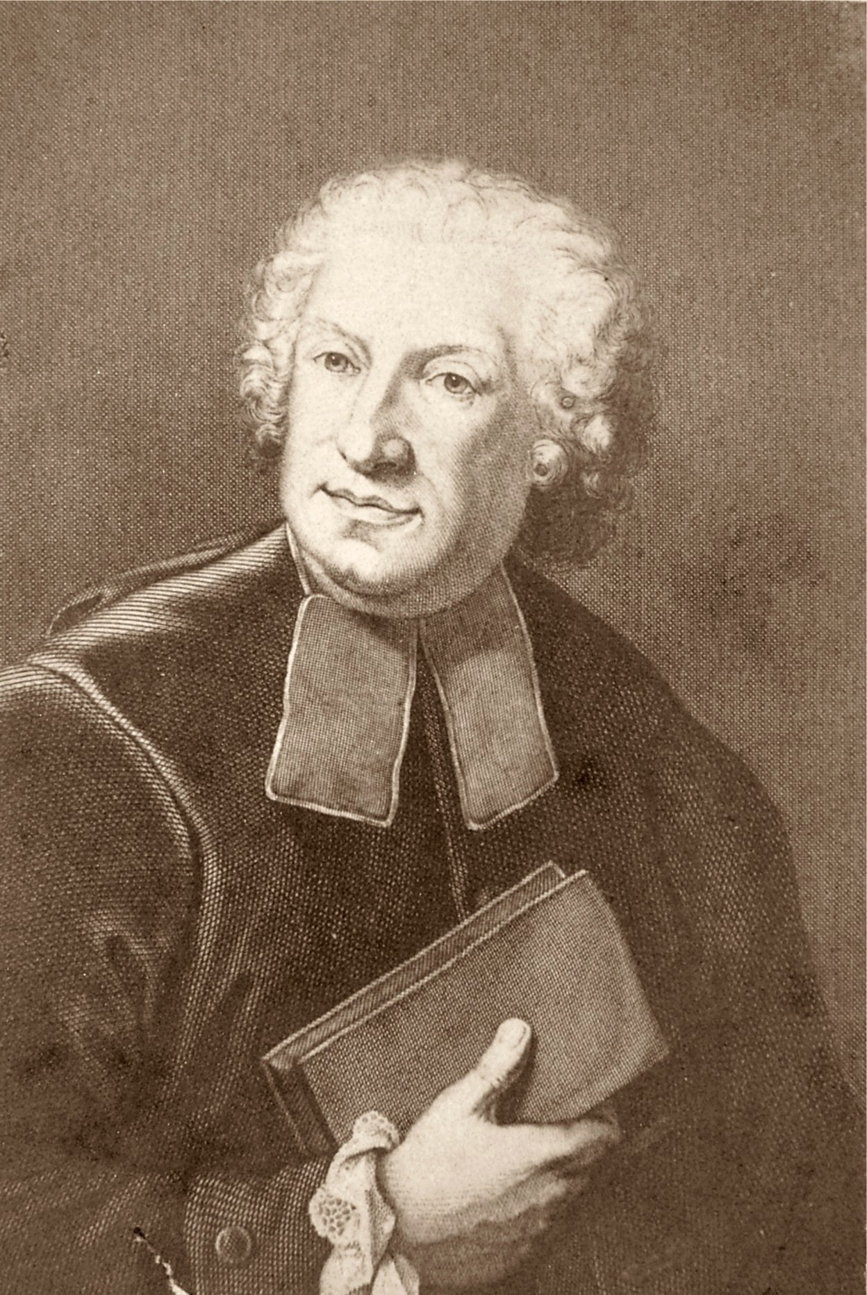 Pietro Trapassi, Pseudonym: Pietro Metastasio 1698-1782 italienischer Dichter und Librettist.